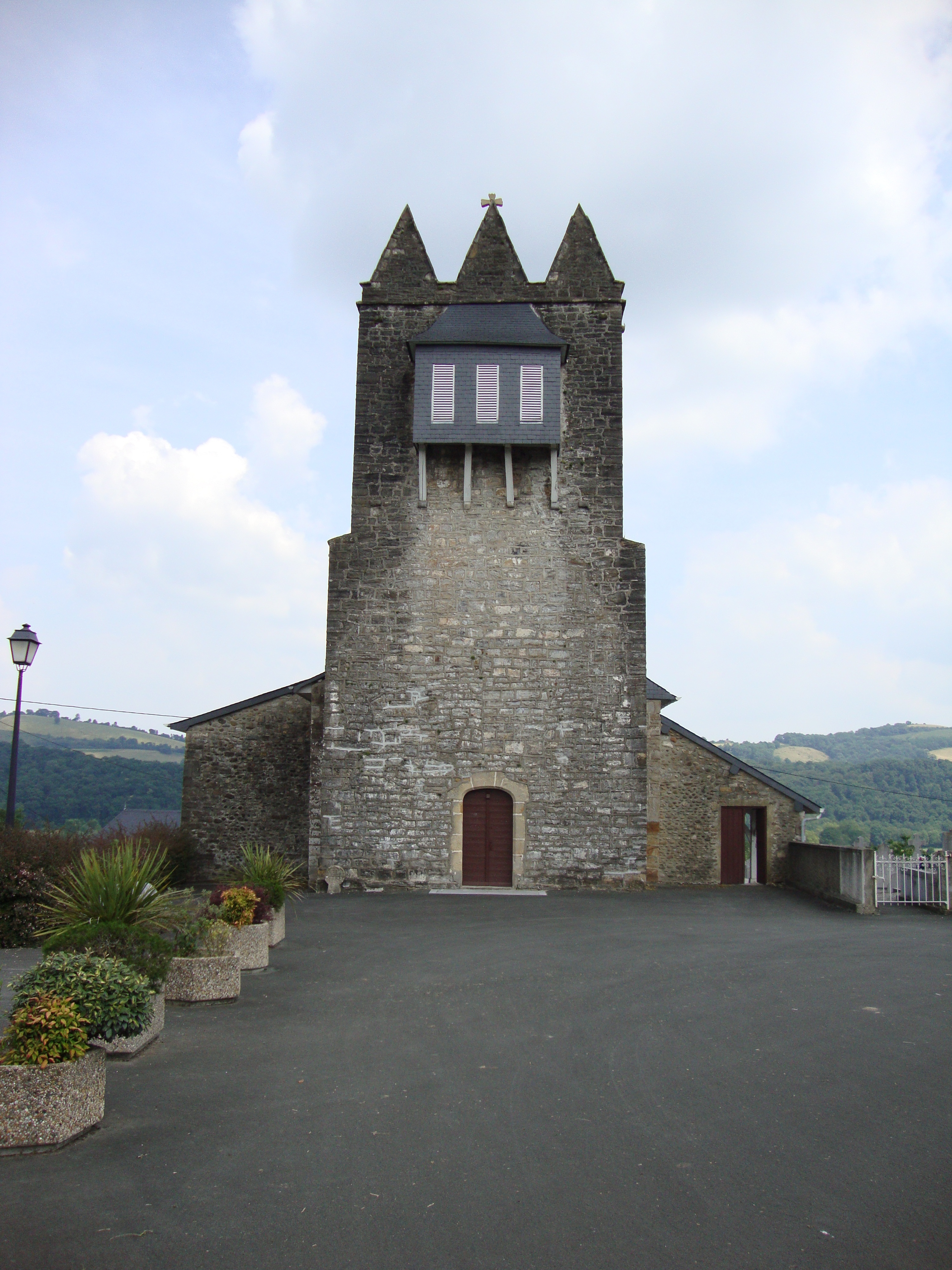 Undurein (Espès-Undurein, Pyr-Atl, Fr) église trinitaire,coté façade